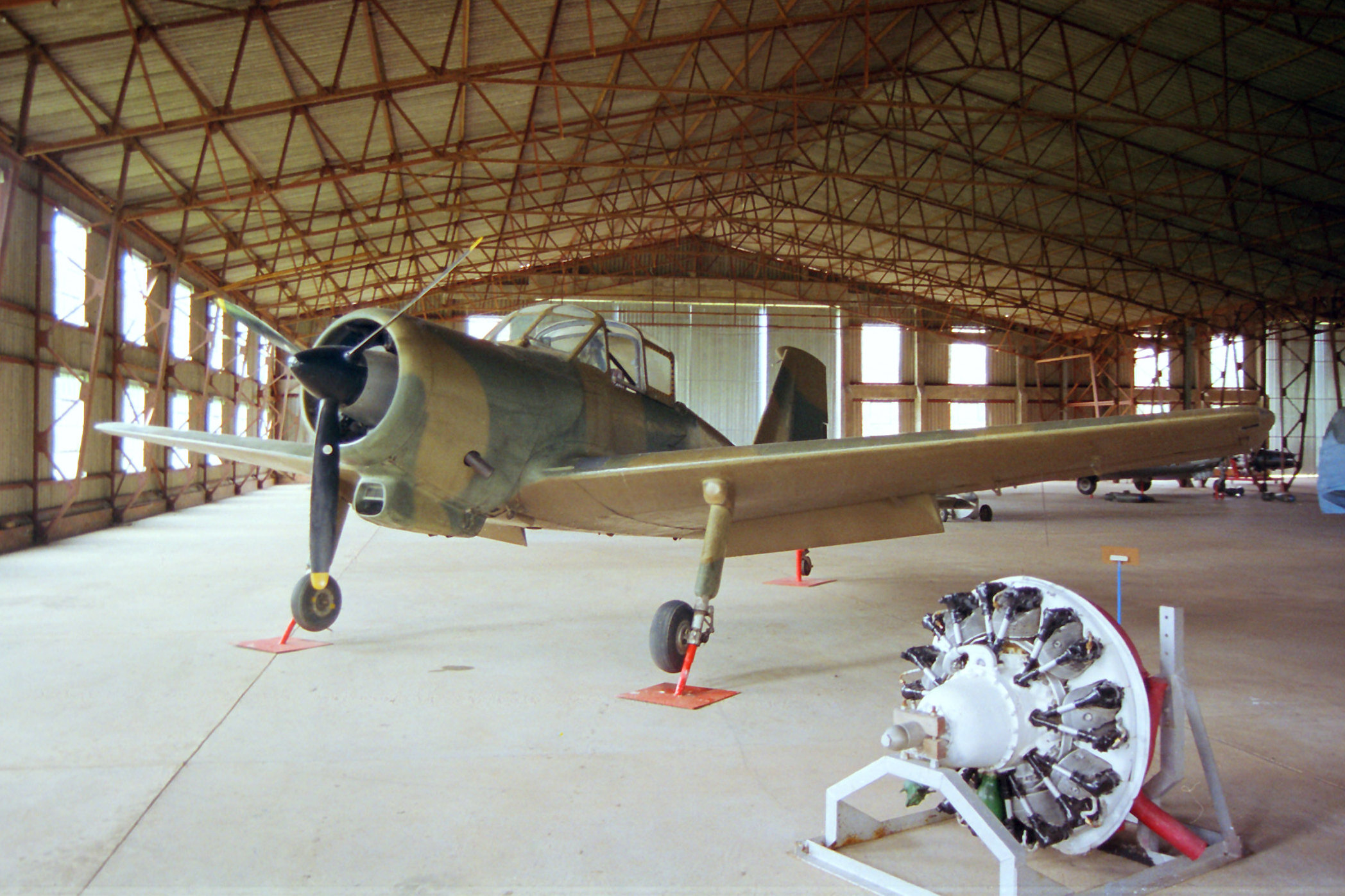 3614 Percival Provost T.52